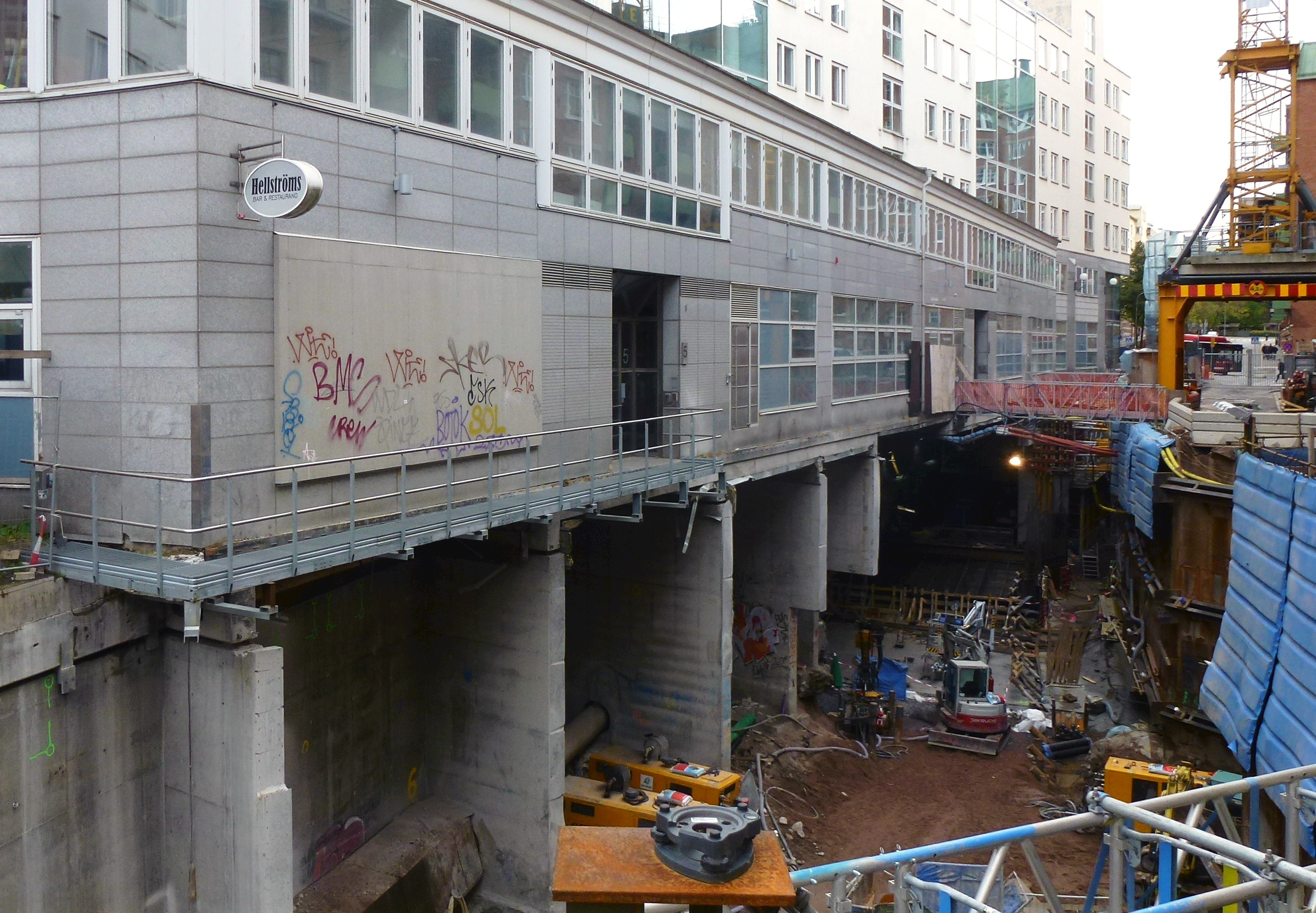 Södermalmstunneln vid Stockholms södra station